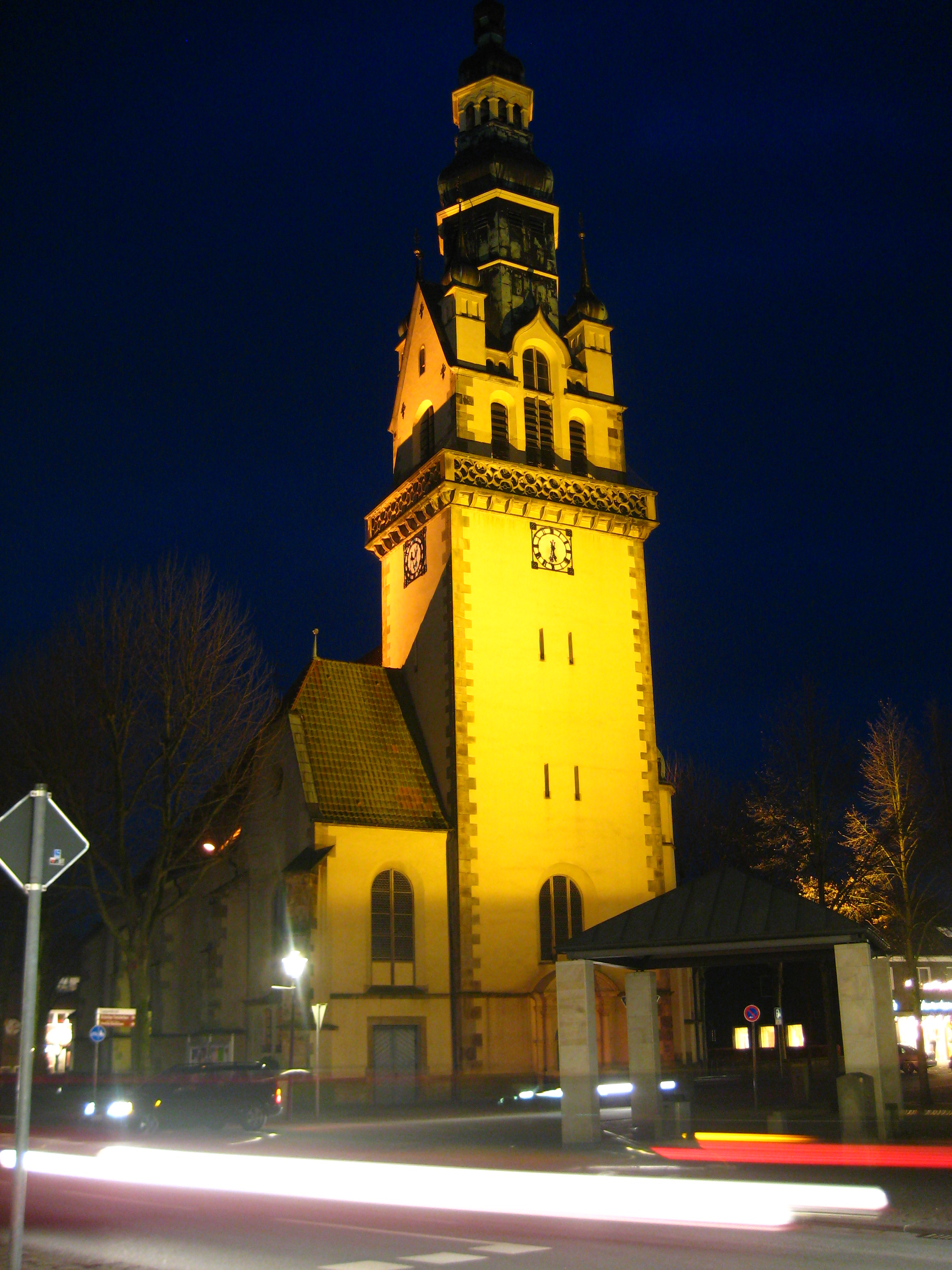 Das ist die Pfarrkirche St. Johannes Ev. von 1648 in der Dämmerung aufgenommen